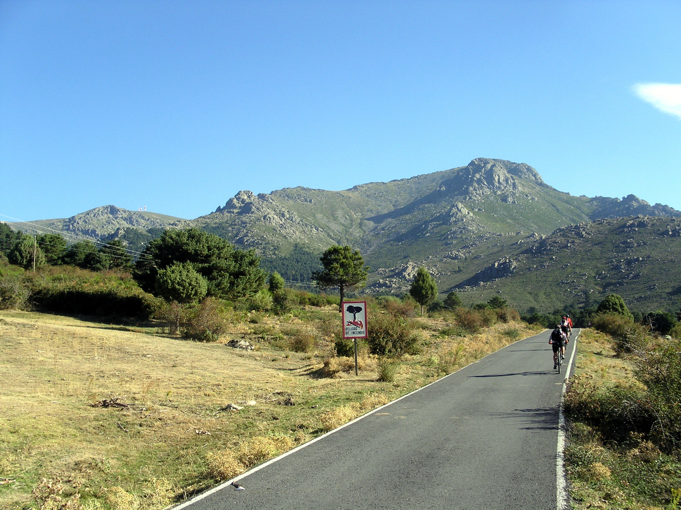 2010-10-02 Carretera a La Barranca con la Bola del Mundo al fondo